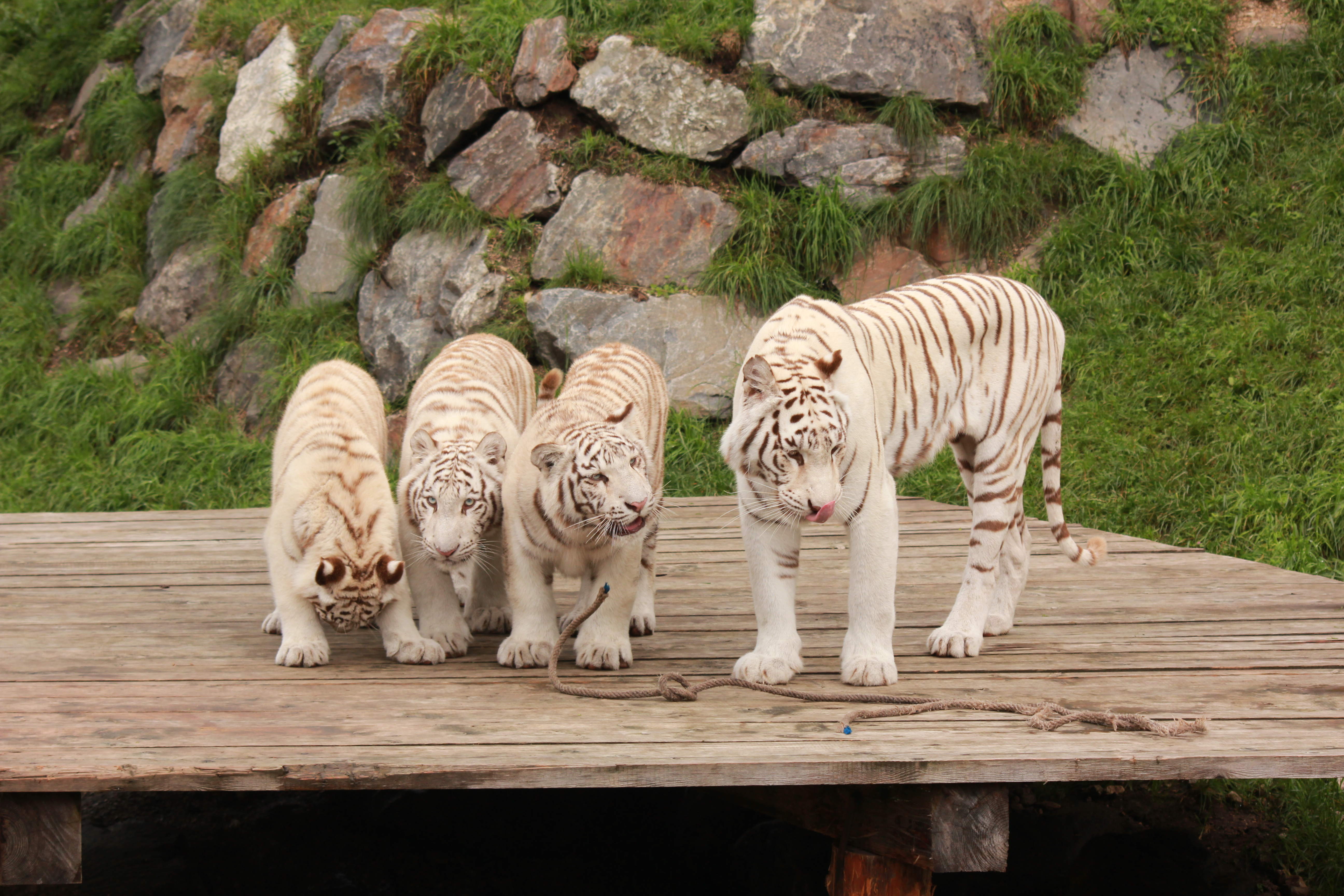 Weiße Tiger im Weißen Zoo des Kameltheaters Kernhof in Niederösterreich